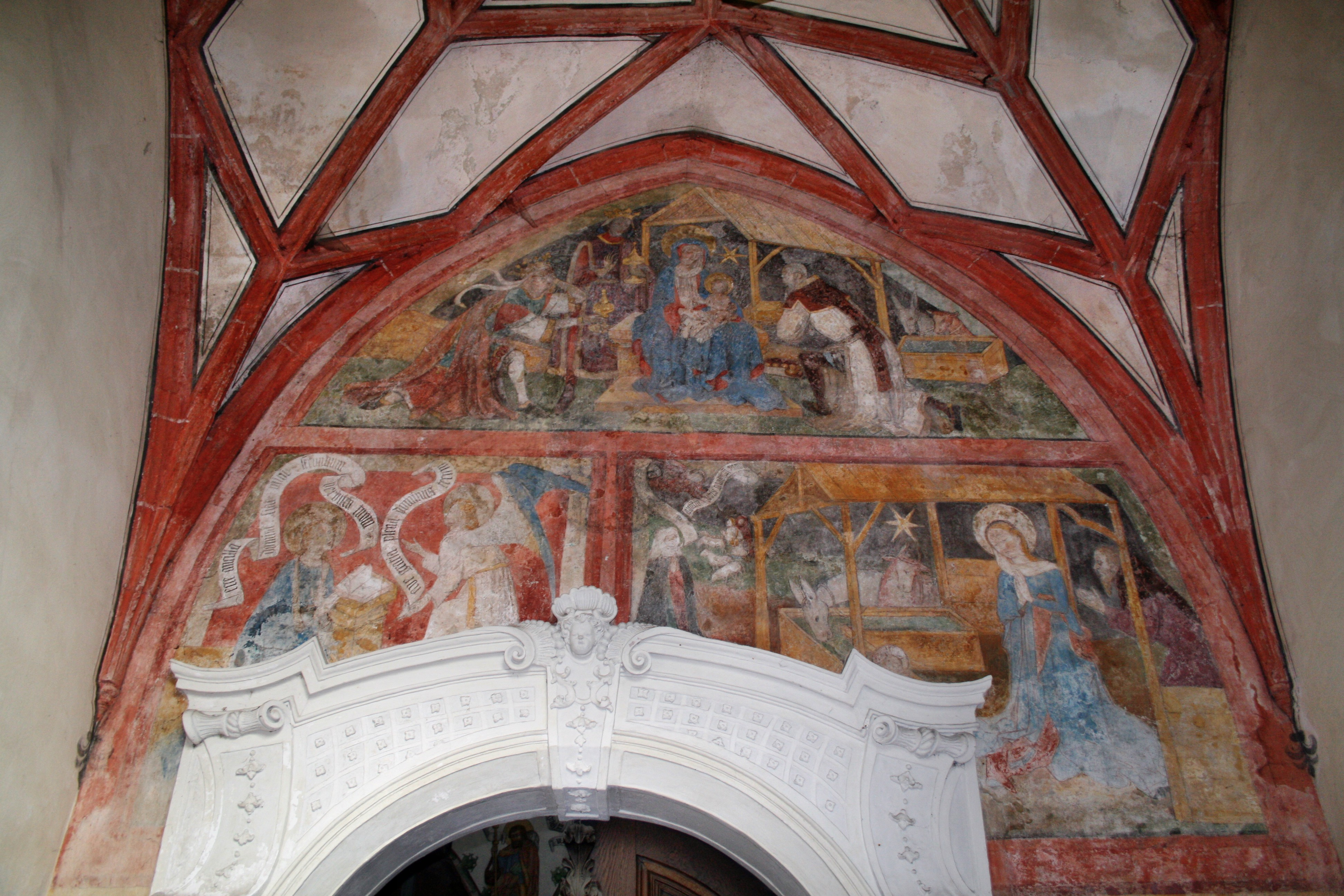 Unser Frauen (Memmingen), Fresko um 1460 aus der Memminger Schule